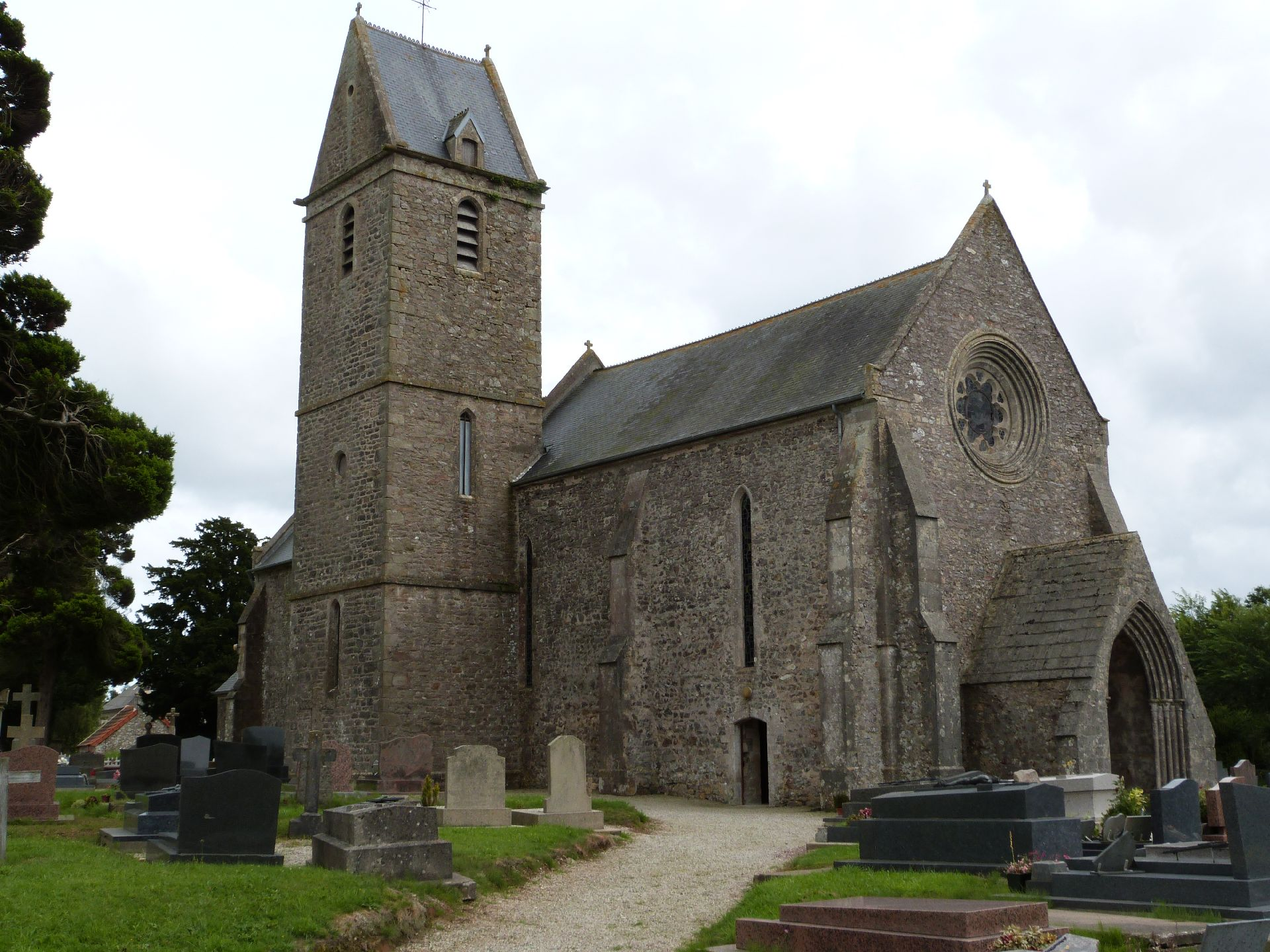 L'église Saint Pierre